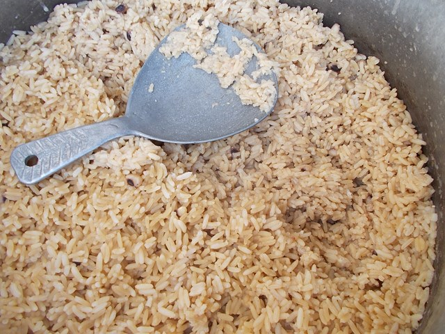 Riz cuit avec le haricot avec addition de potasse This is an image of food from Togo